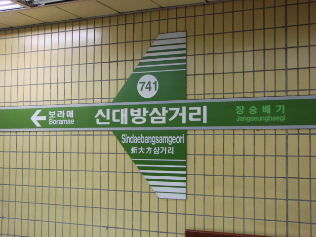 ソウル地下鉄7号線新大方サムゴリ駅 駅名標